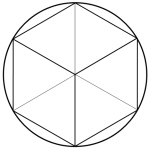 Rune Hagalaz